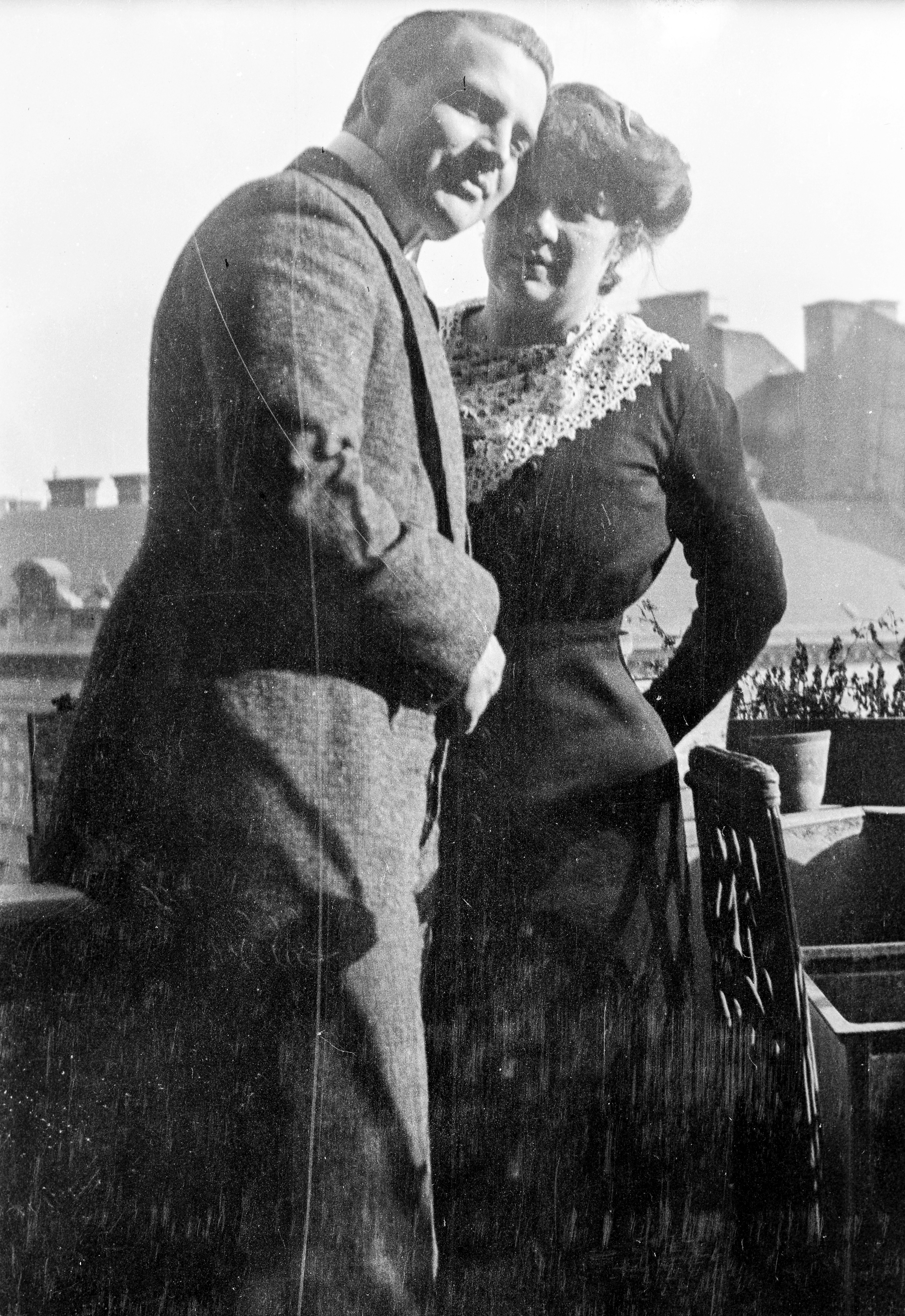 József körút 31/b., Kürthy György és Vízváry Mariska színművészek. Location: Hungary, Budapest VIII. Tags: double portrait, man, lady, celebrity, balcony, Budapest Title: József körút 31/b., Kürthy György és Vízváry Mariska színművészek.